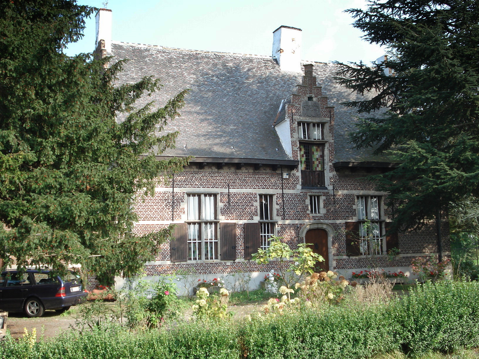 Labristratenhof, ofte 'Spokenhof', te Boechout bij Antwerpen.